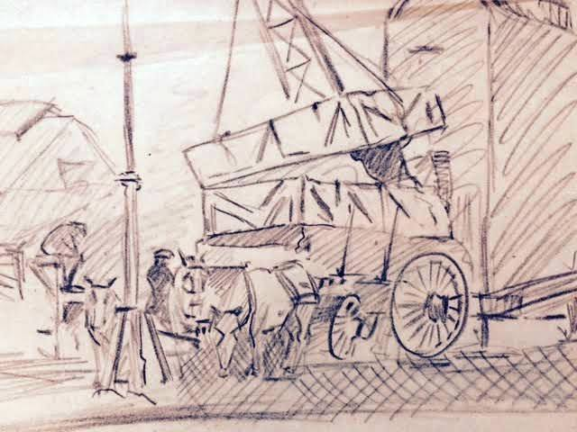 S/T (trabajo en el puerto de La Boca)